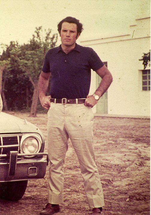 Raúl Othacehé (intendente de Merlo desde 1991) en su juventud.